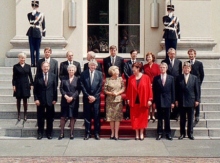 De bordesscène van het kabinet-Kok II bij Huis ten Bosch op 3 augustus 1998